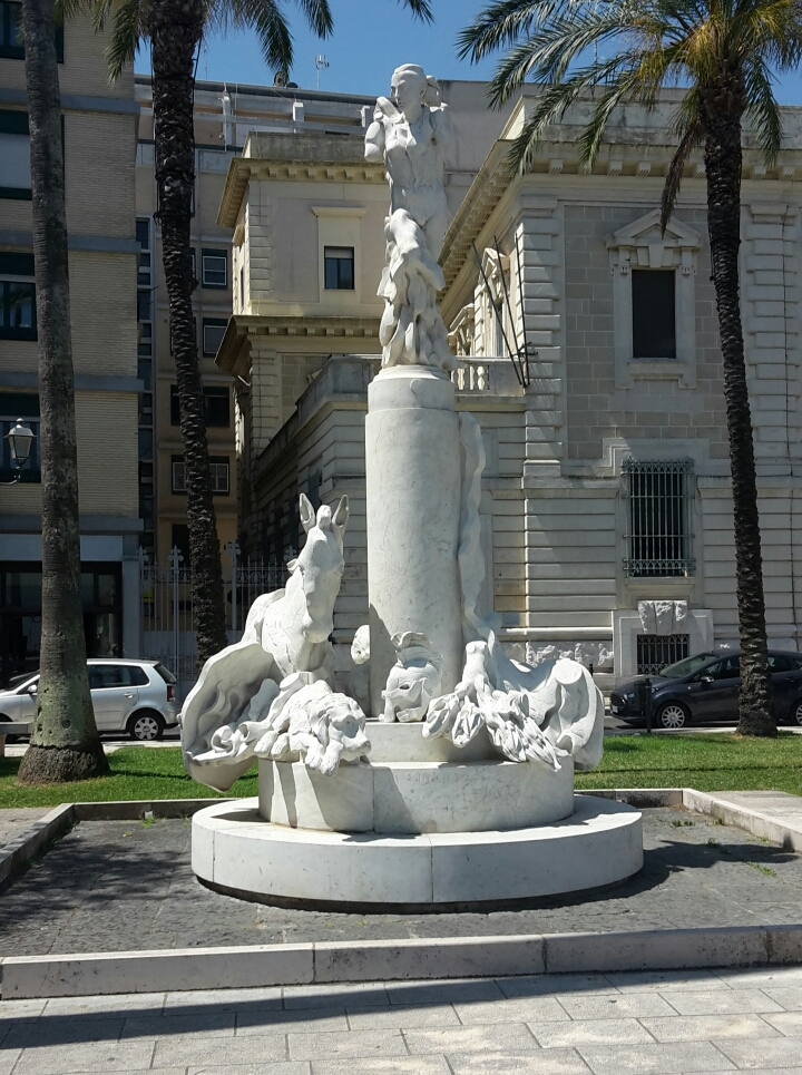 Monumento a Publio Virgilio Marone, a Brindisi.